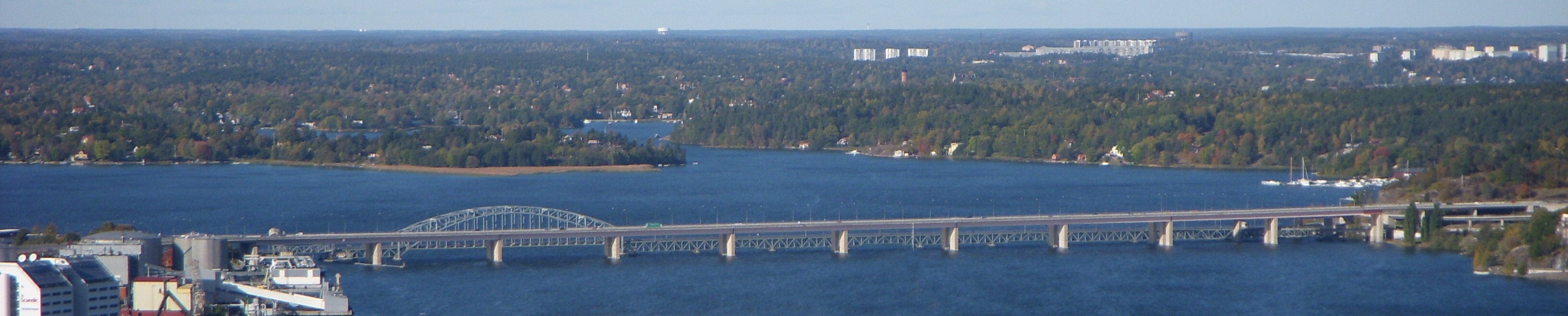 Lidingöbron från Kaknästornet